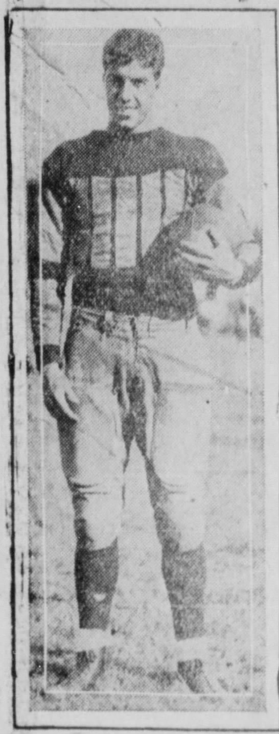 Florida Gators quarterback Clyde "Cannonball" Crabtree